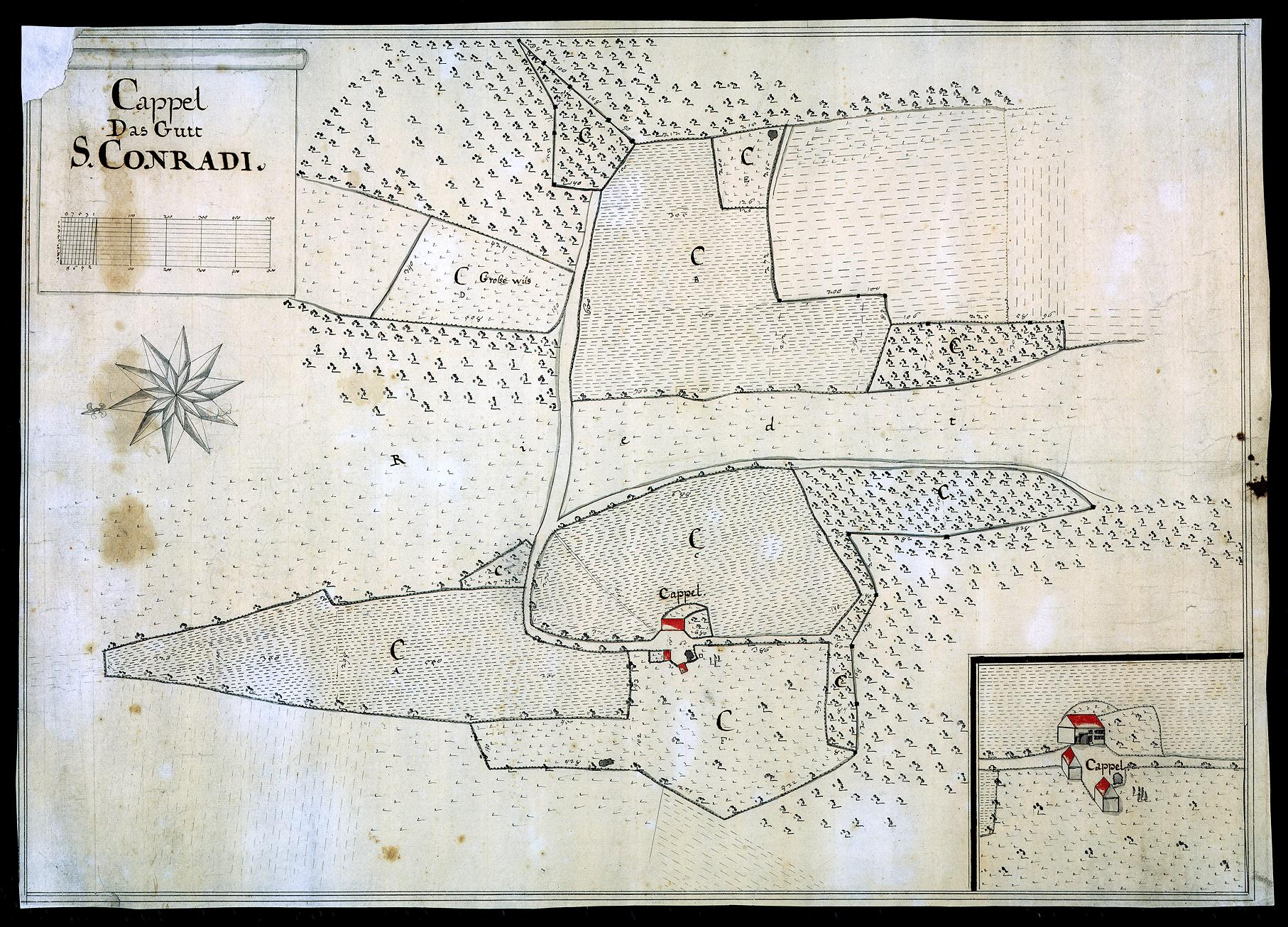 Kappelhof